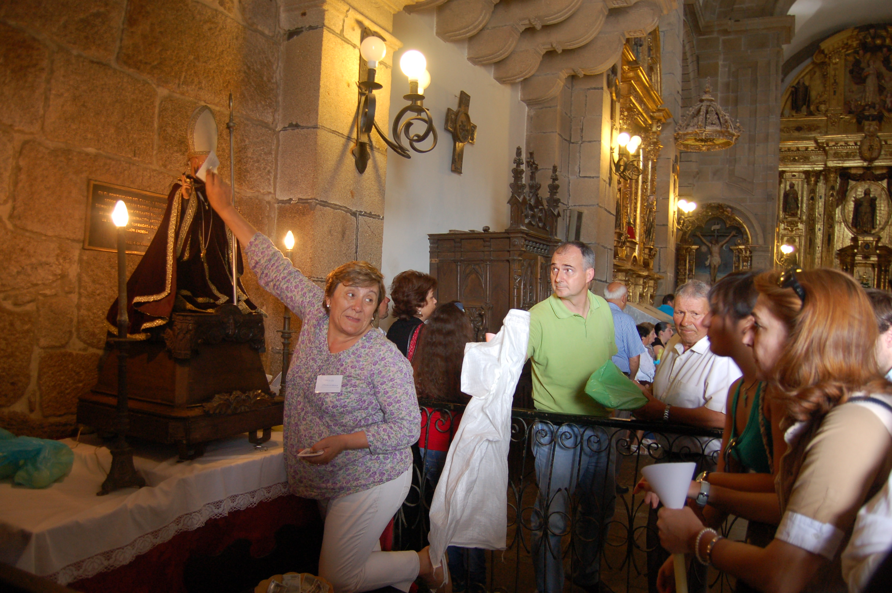 Fieis ante a figura de San Bieito na romaría de San Benitiño, no mosteiro de San Salvador de Lérez.